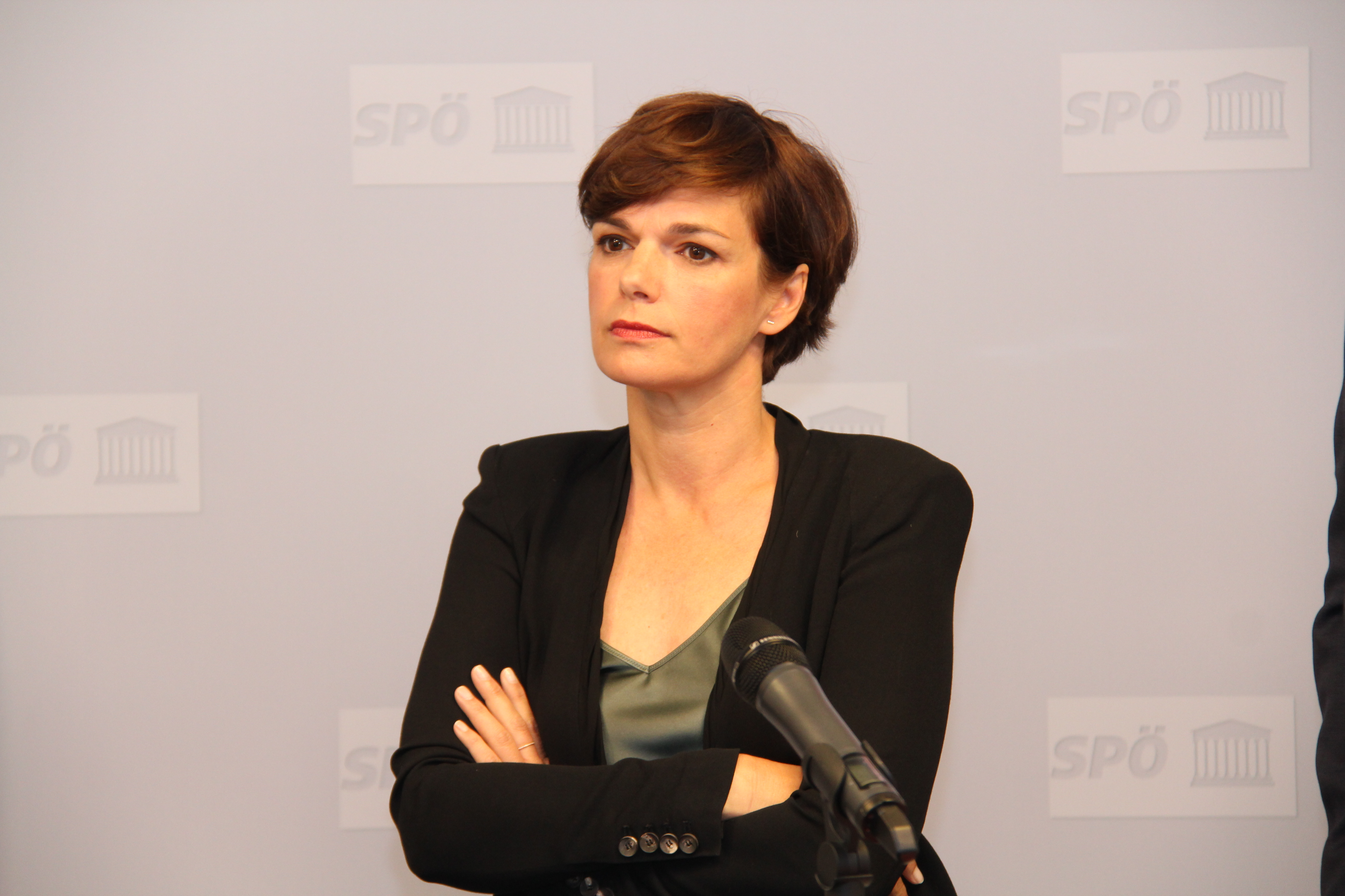 SPÖ-Gesundheitssprecherin Pamela Rendi-Wagner gemeinsam mit renommierten Arbeitsmedizinern am 3. Juli 2018